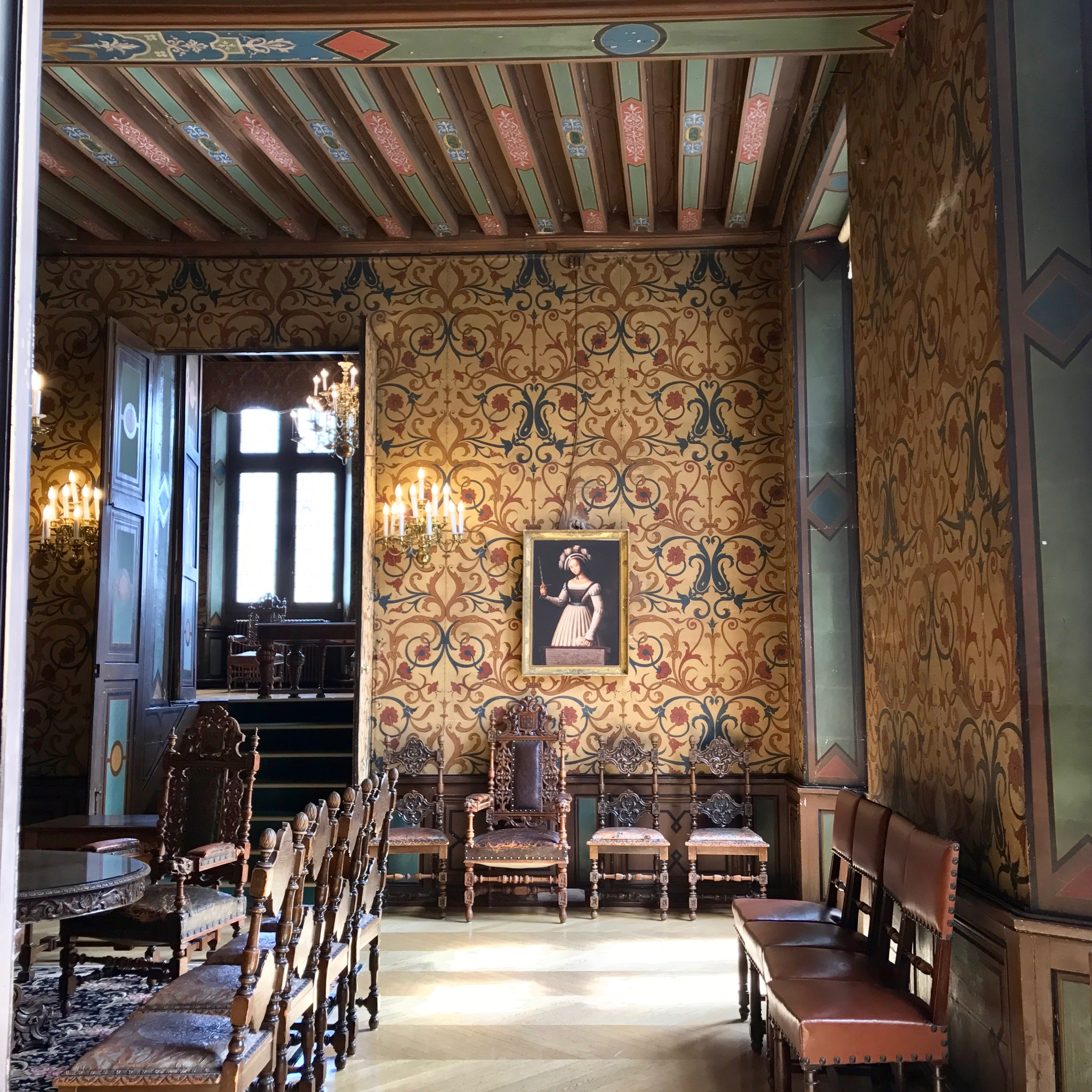 En 1560, le roi François II est mort dans cette salle. .